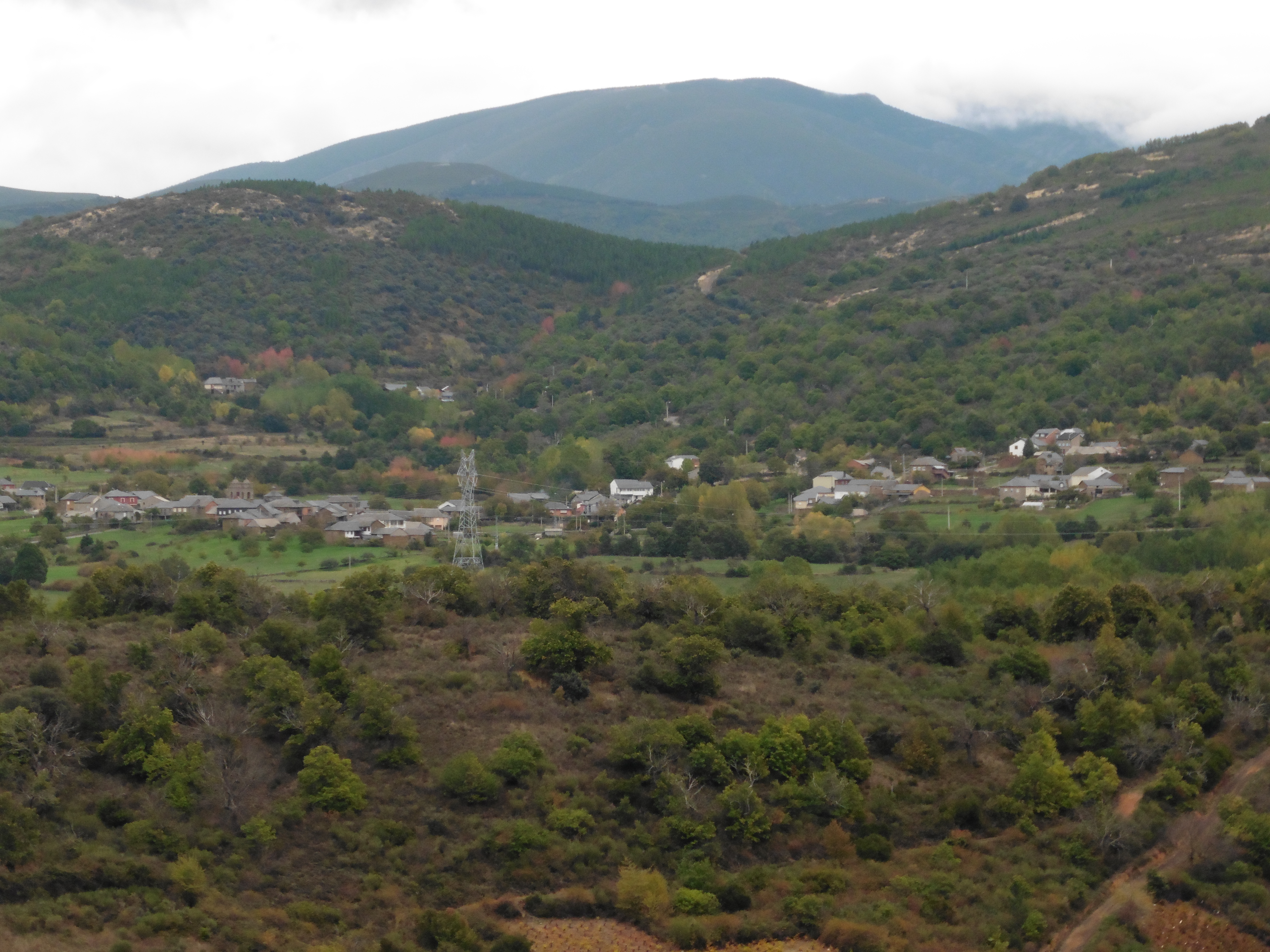 Panorámica de Langre con el Barrio al fondo a la izquierda.